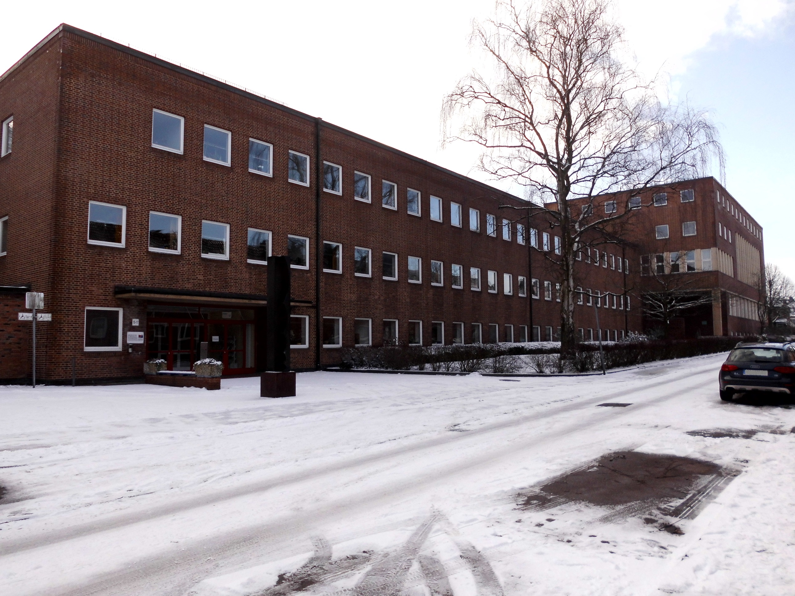 Fröbelstraße 15-17, Kiel-Gaarden-Süd / Kronsburg